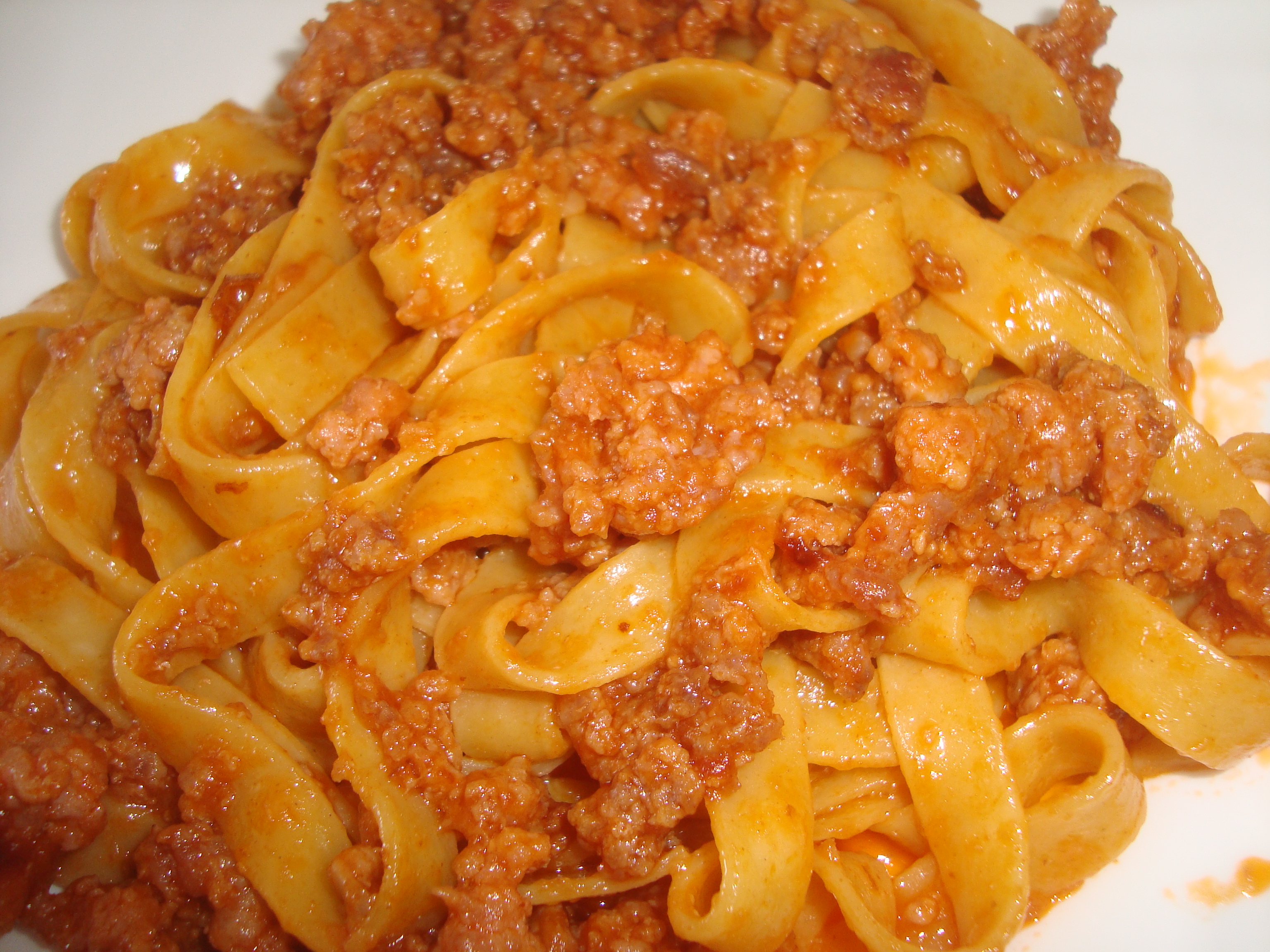 Cintas de pasta